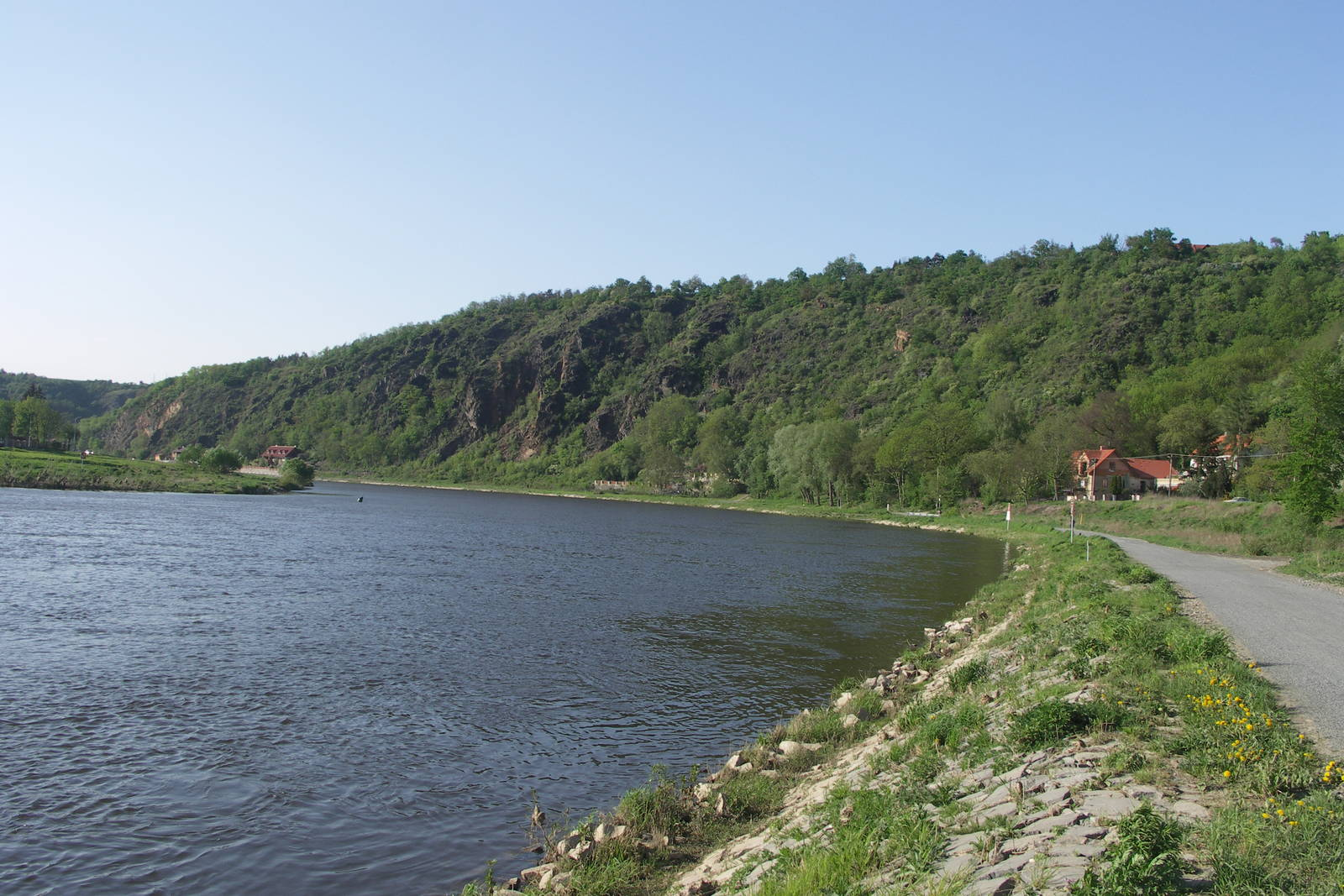 Přírodní rezervace Podhoří v Praze, Czech Republic